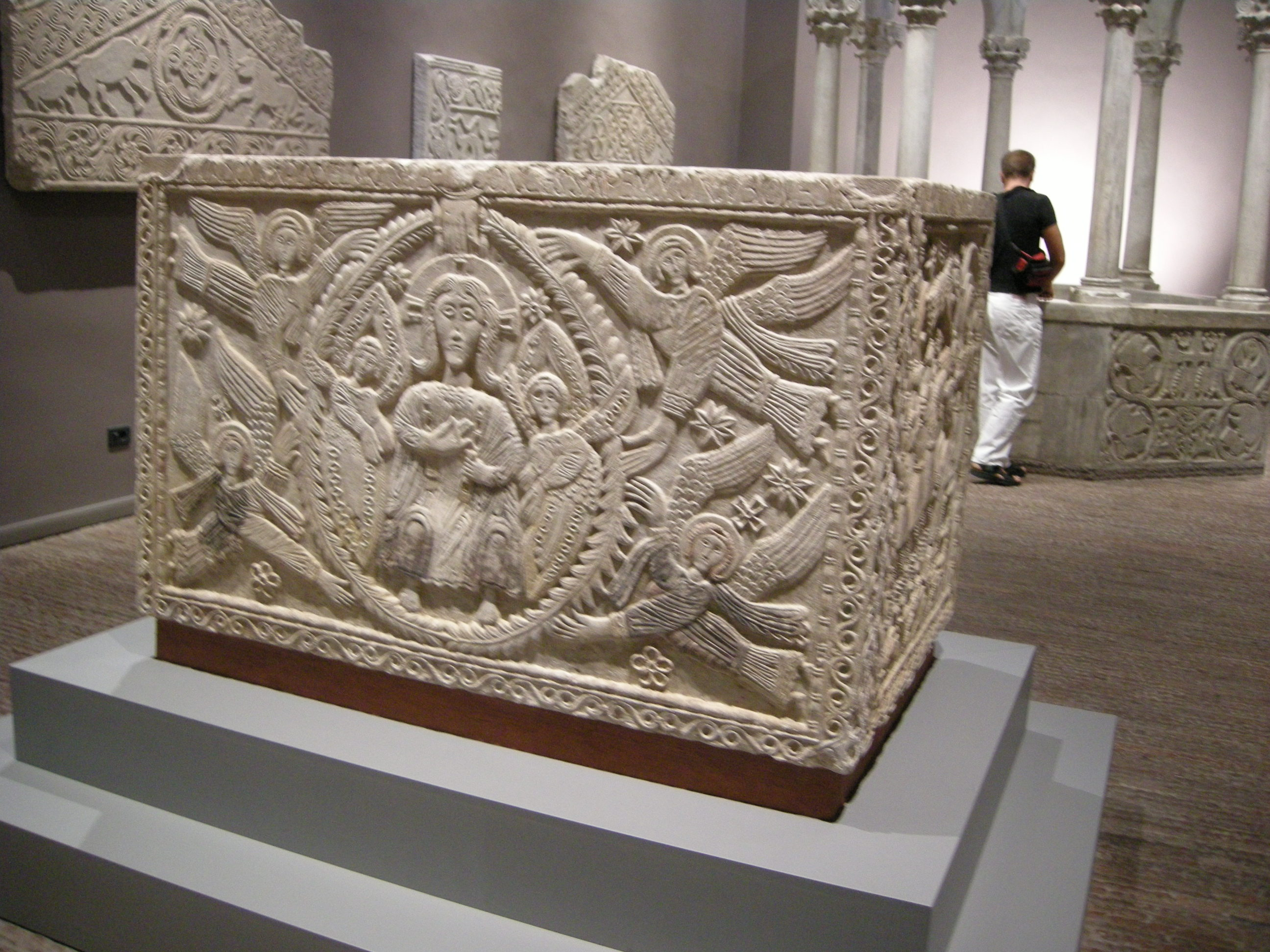 Cividale, museo cristiano, altare del duca rachis